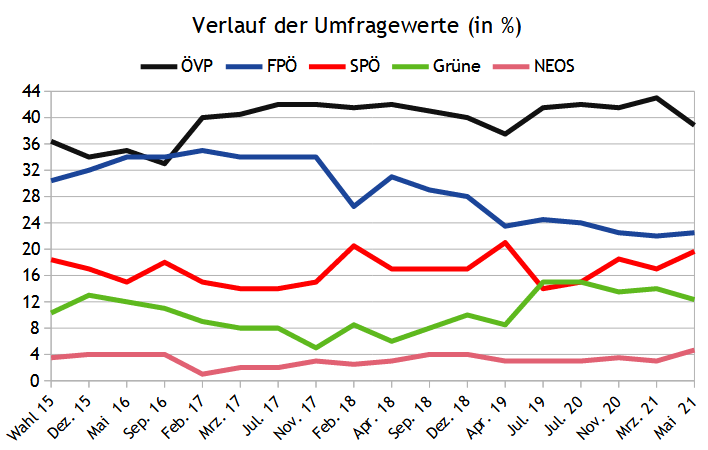 Landtagswahl Oberösterreich 2021 Umfragen